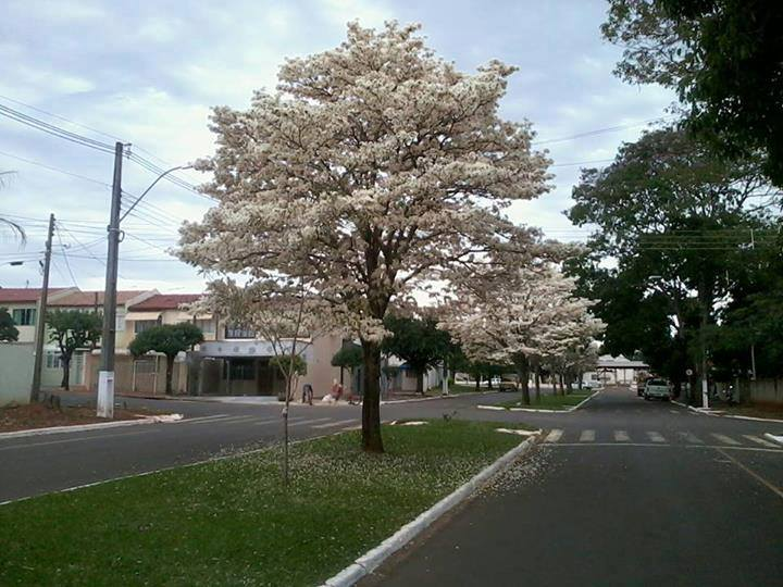 Ipe Branco na Avenida Paraná, em Goioerê-PR